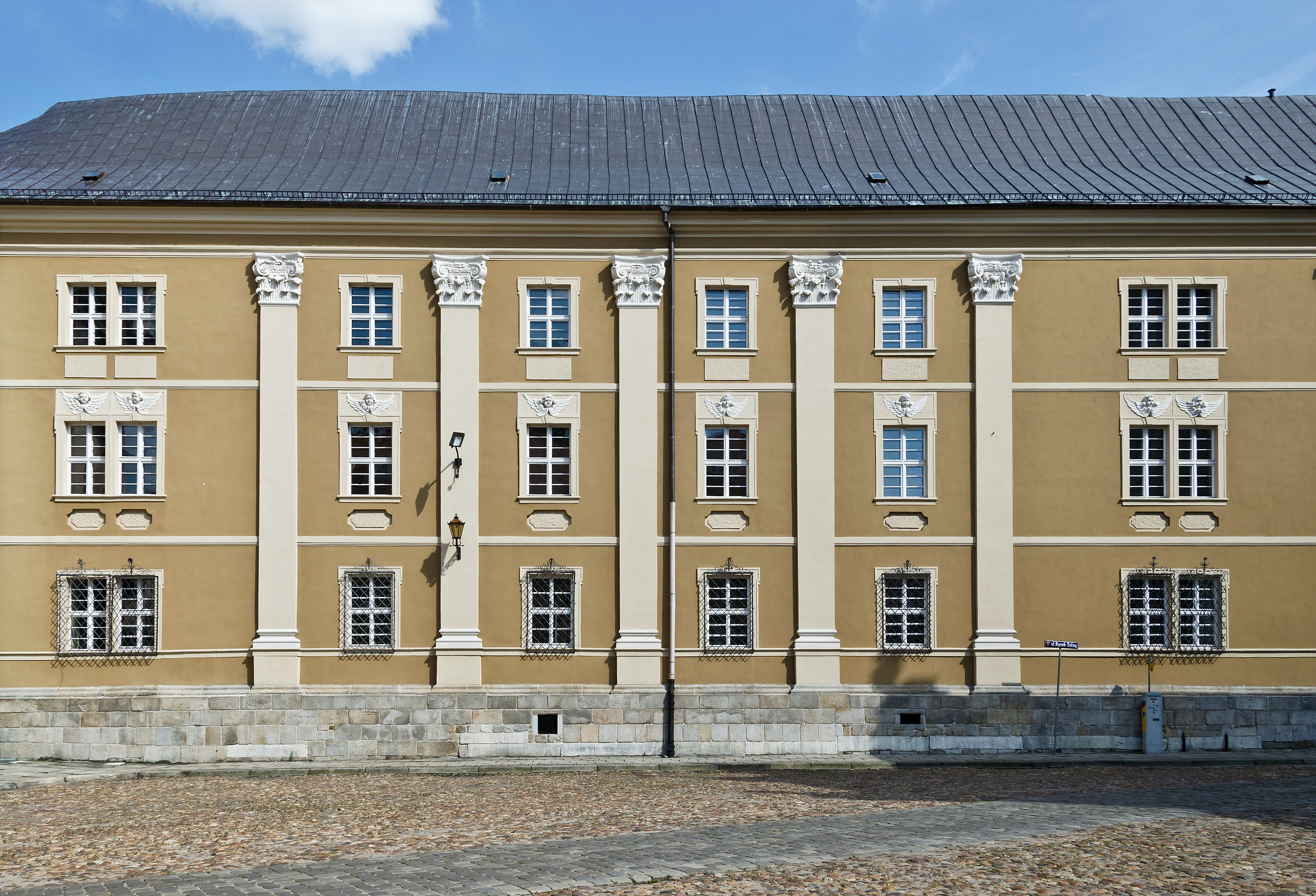 Nysa, kolegium Carolinum, ob. LO im. Jana III Sobieskiego, 1669-1673